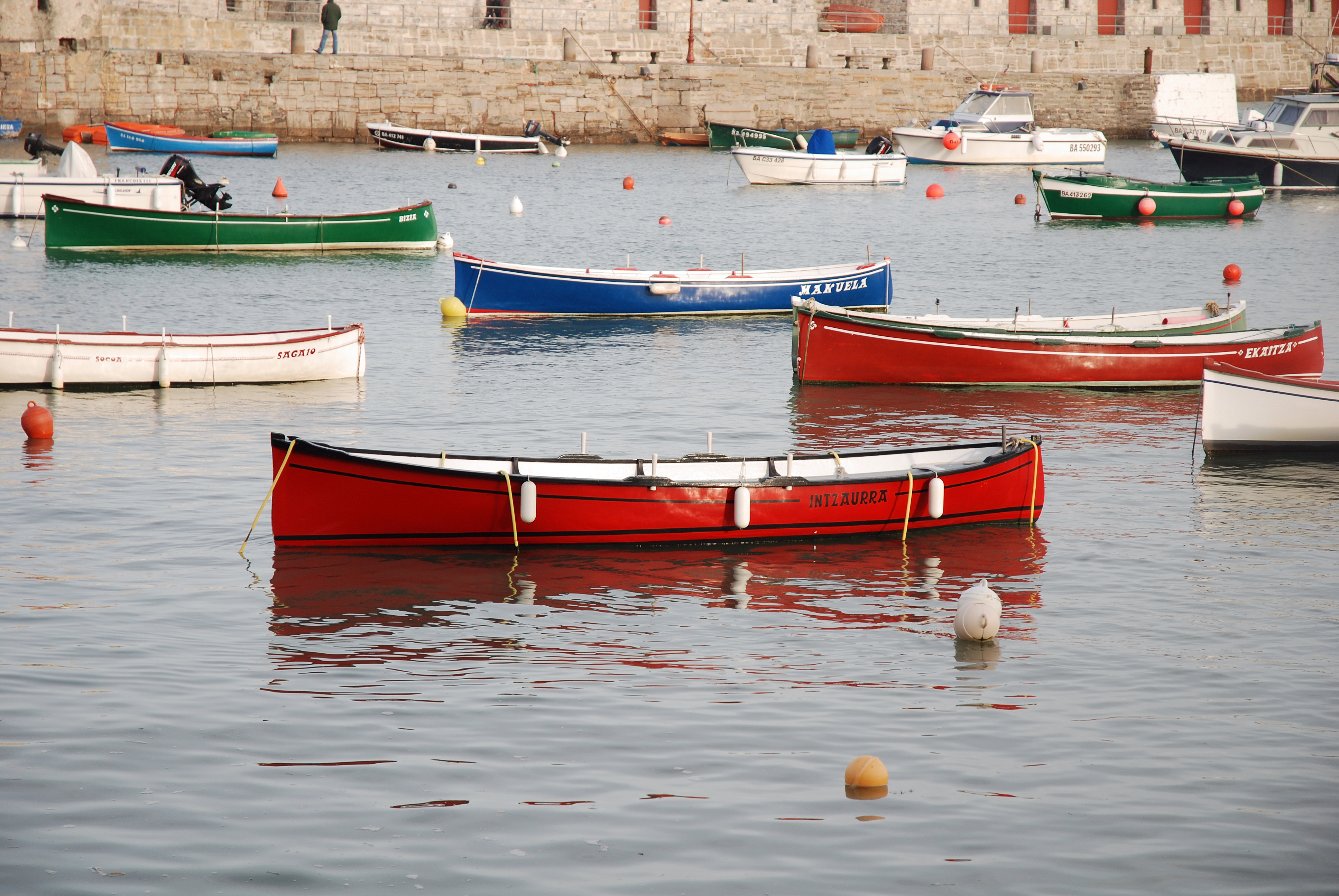 Trainières dans le port de Socoa. Photo prise le 03/01/07 par Harrieta171